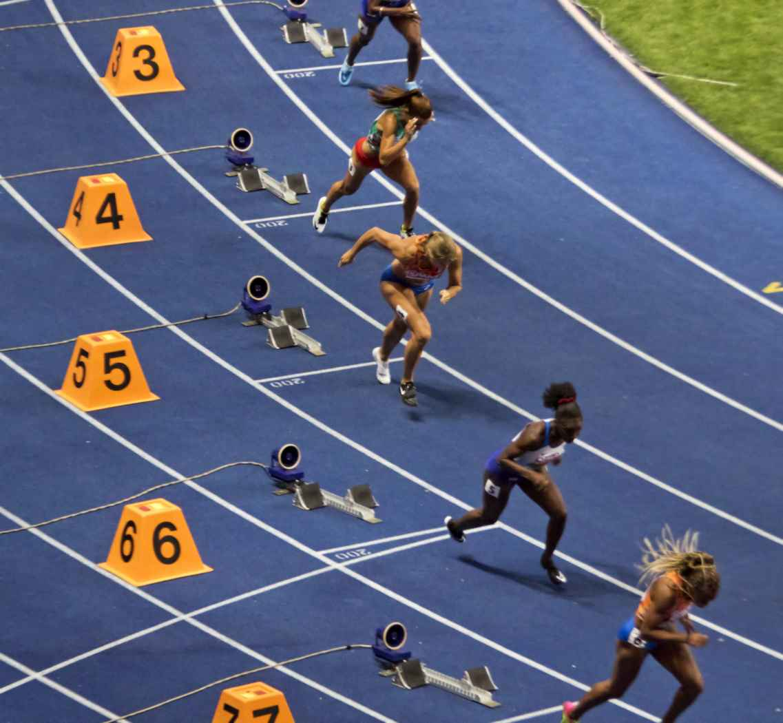 EKB42549 start finale 200m dames